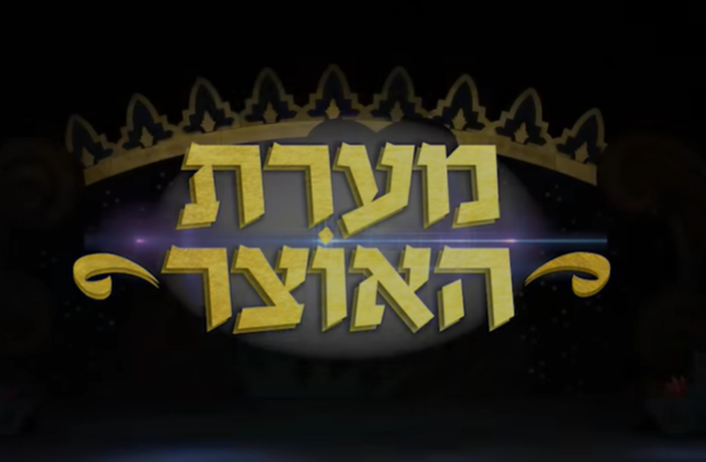 המחזמר מערת האוצר